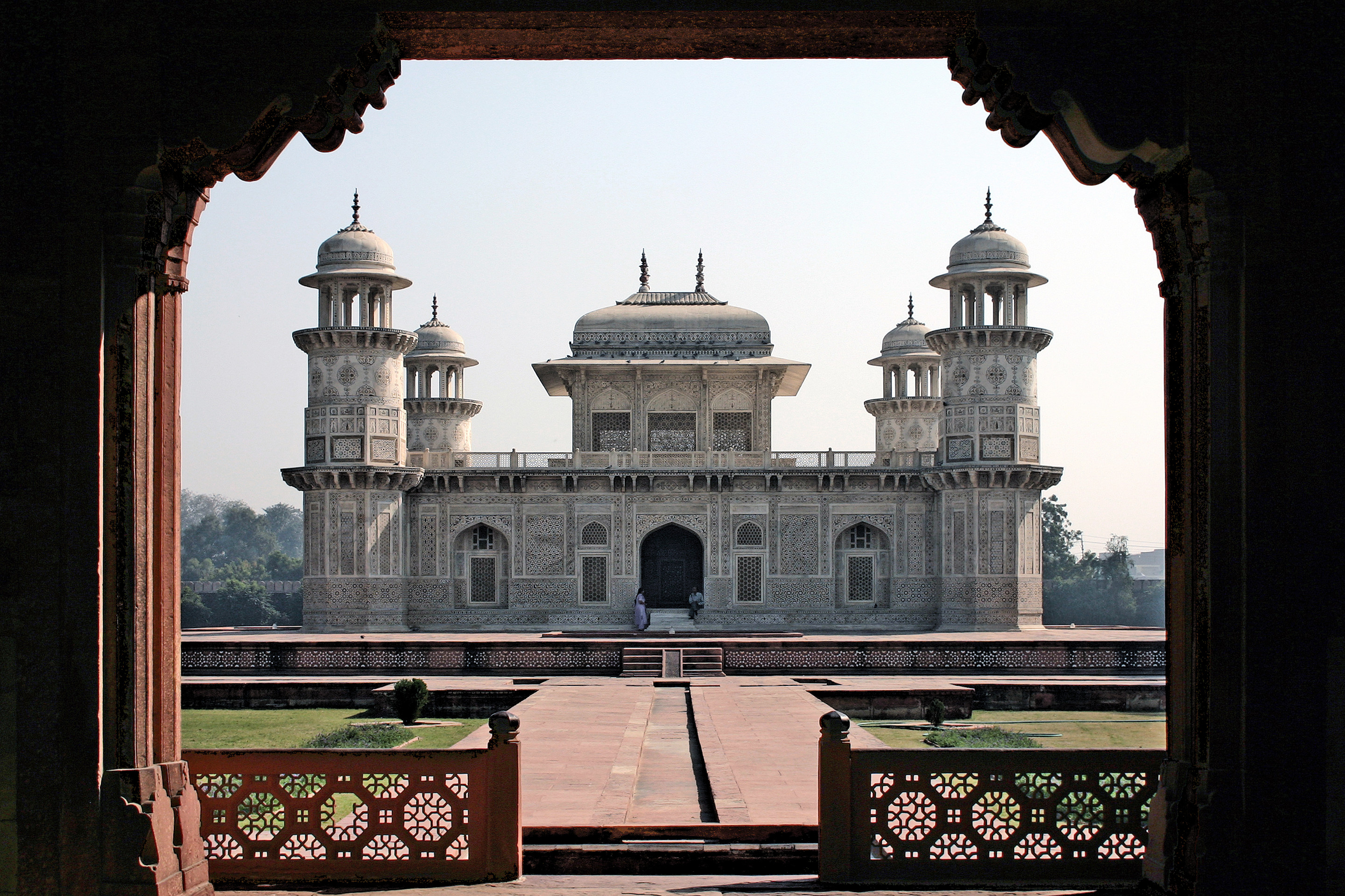 Mausoleum des Itimad-ud-Daula, erbaut 1622-1628, in Agra / Indien